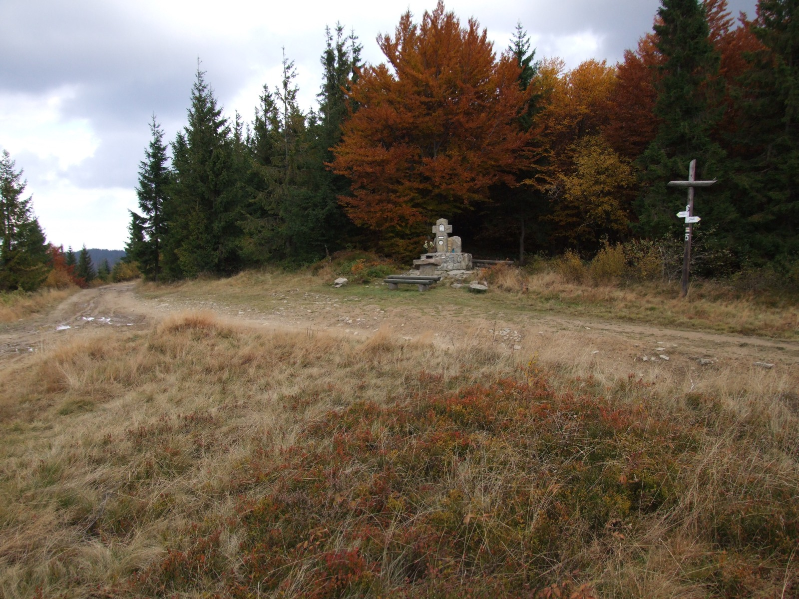 Rozdroże szlaków turyst. na Bukowinie Miejskiej